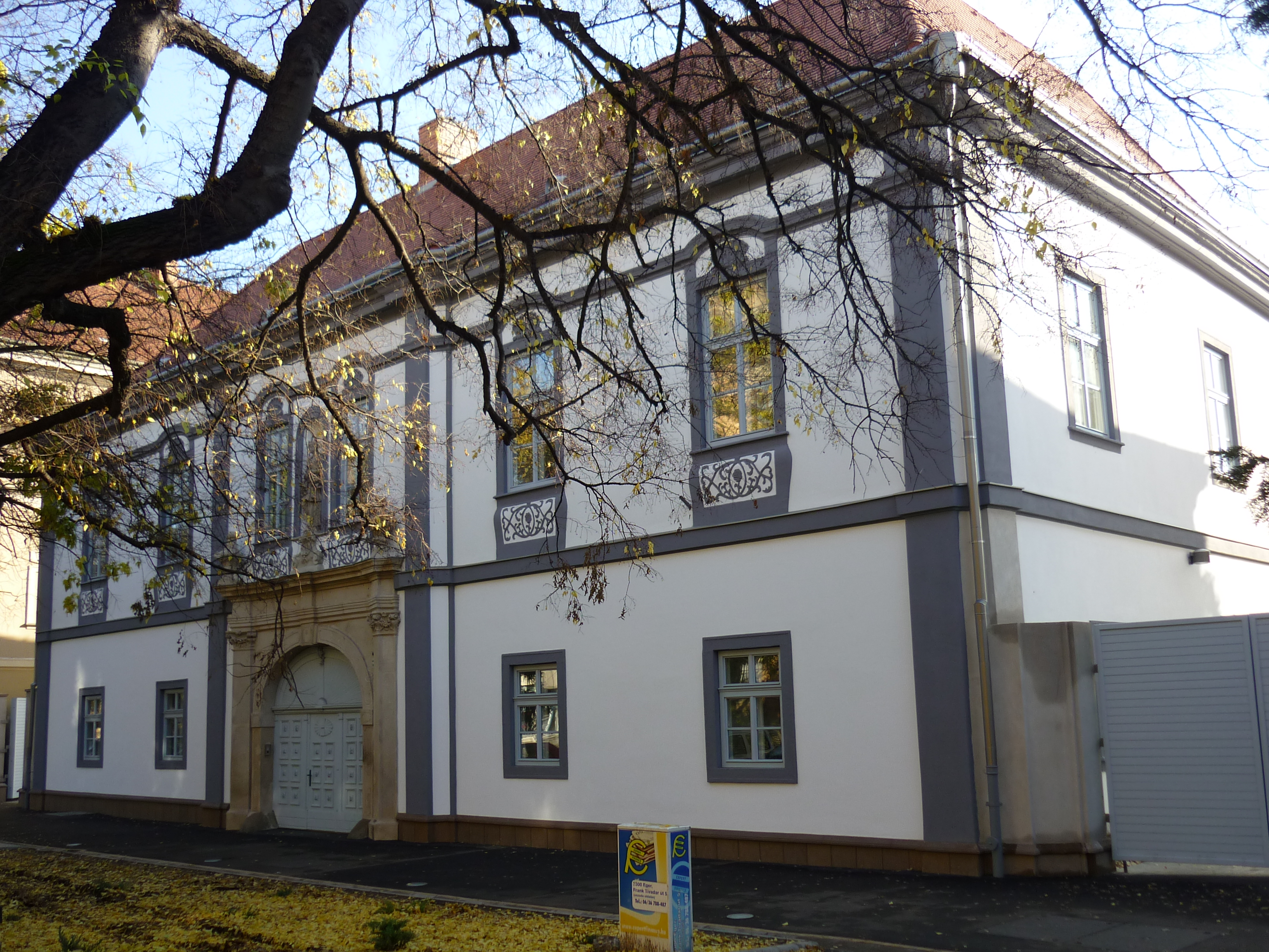 Lakóház Egerben, a Kossuth Lajos utca 6. szám alattVagner-ház. Építtette Vagner János kanonok (építész: Giovanni Battista Carlone ?). Az épületet 1930 körül helyreállították. ID 5532